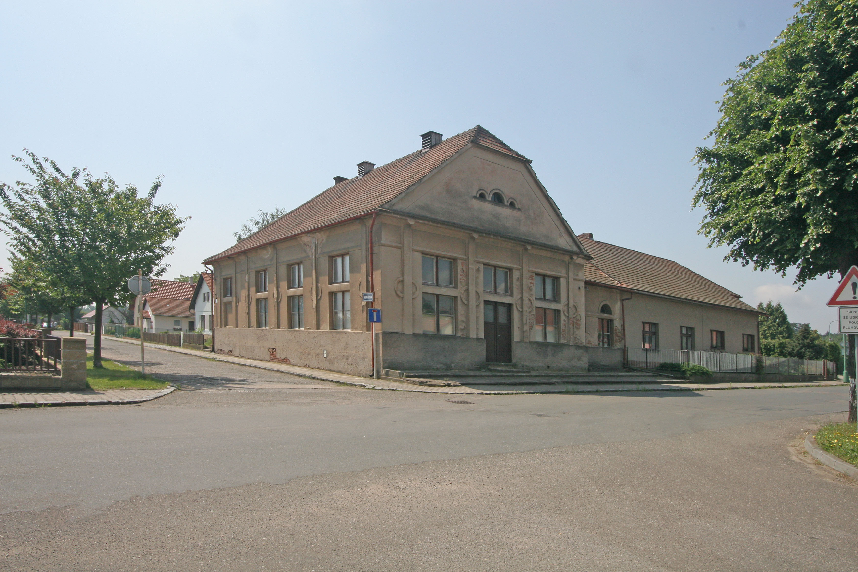 Čeperka čp. 2